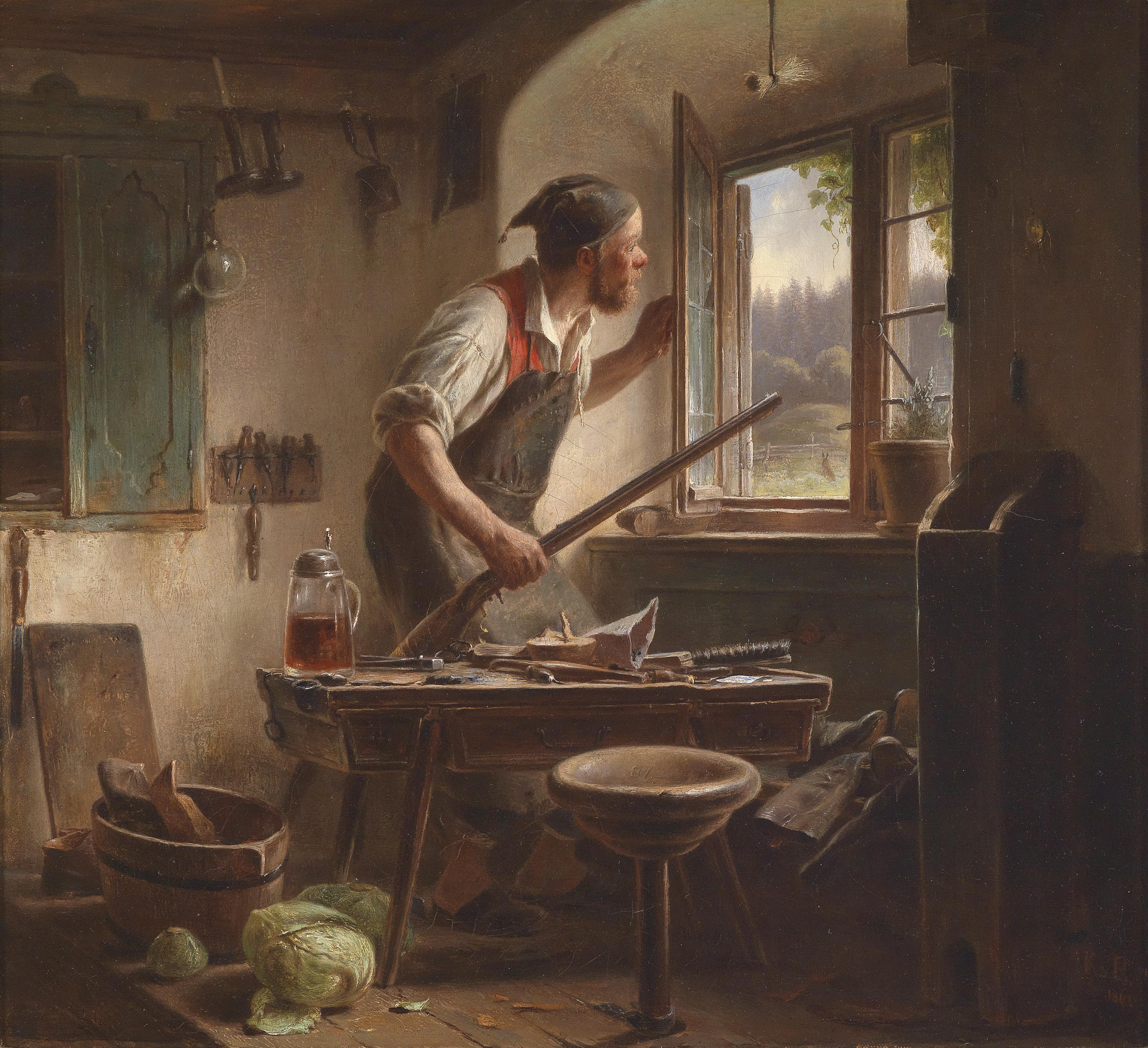 Der wachsame Schuster, signiert datiert K. v. E. fec 1861, Öl auf Leinwand, 32,5 x 36 cm